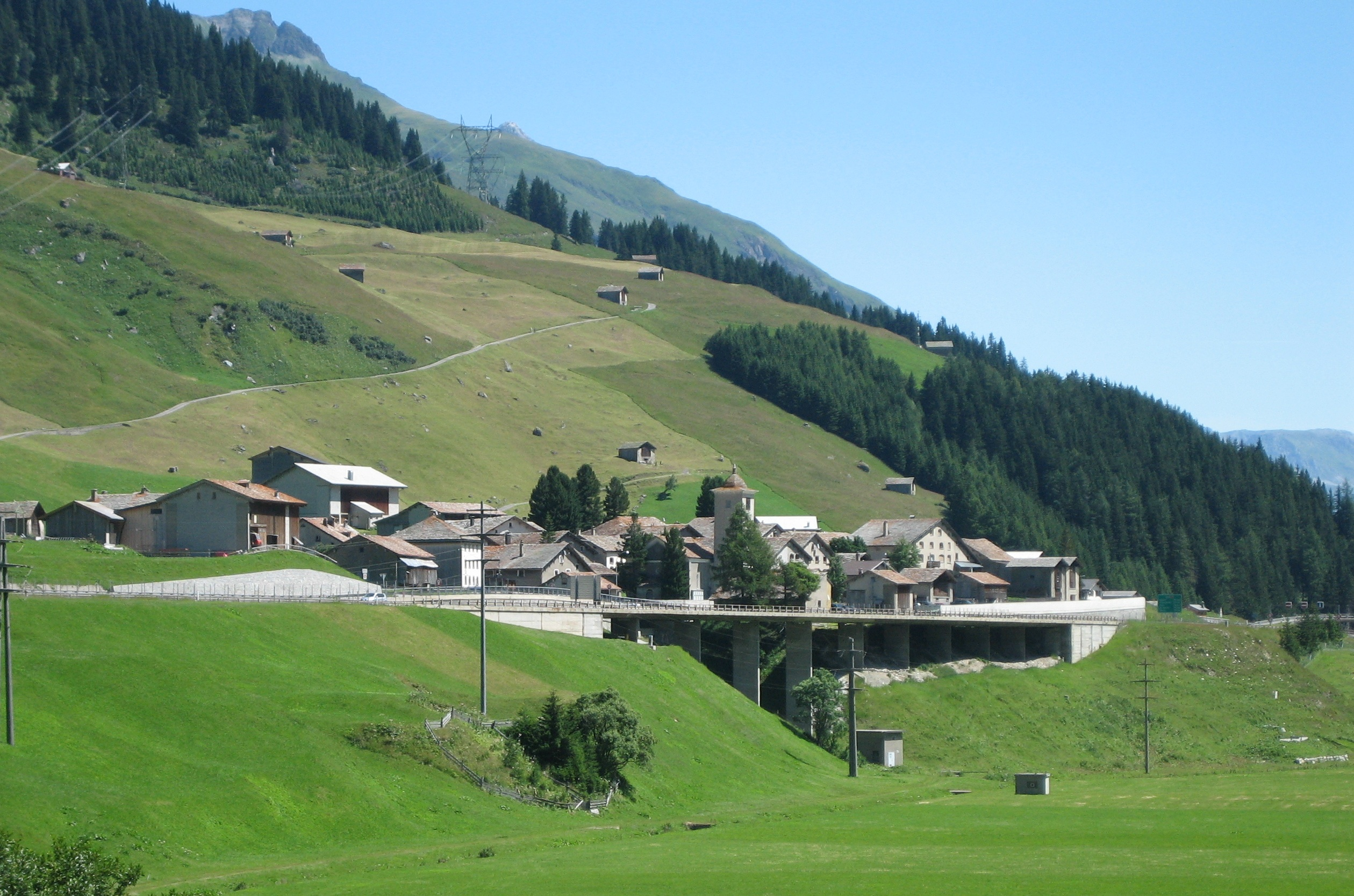 Hinterrhein